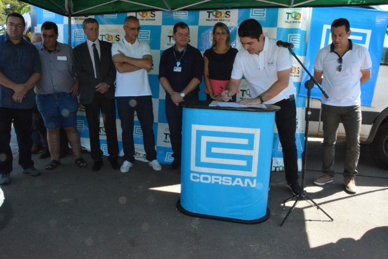 corsan